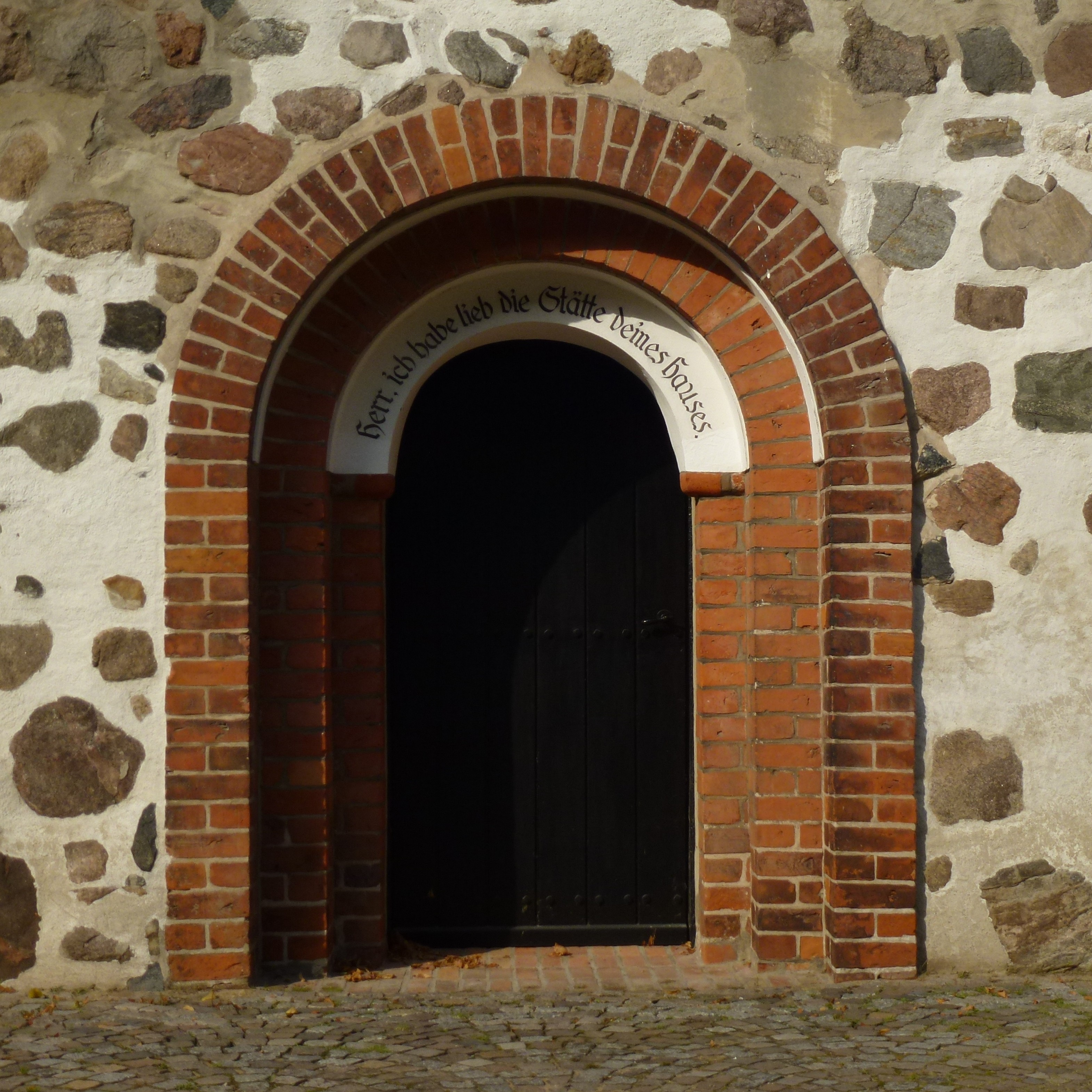 Vicelinkirche in Ratekau